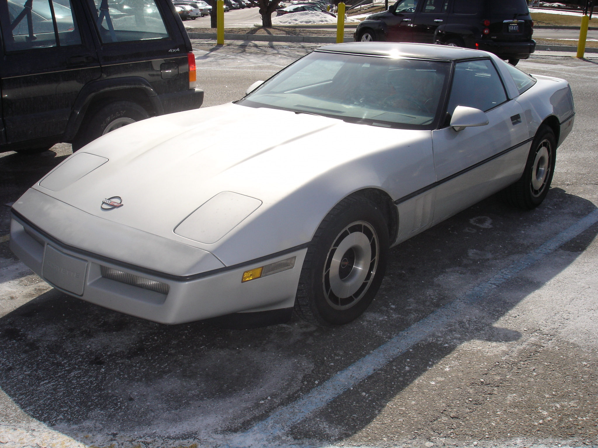 1984 Chevrolet Corvette C4